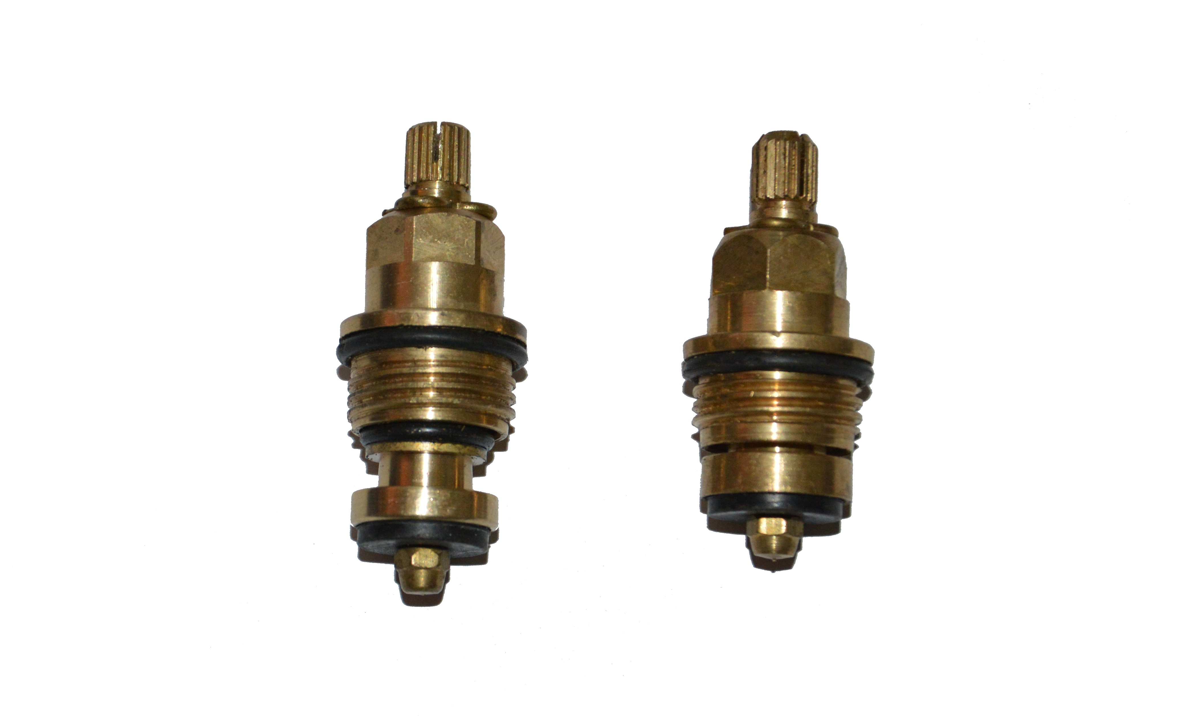 Кран-букса вентильного типа. Открытое и закрытое состояние.